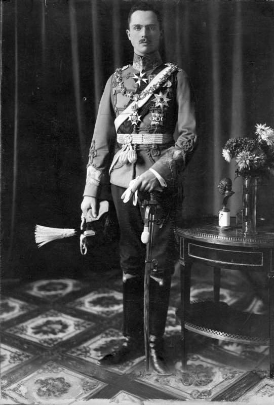 Karl-Eduard von Sachsen-Coburg und Gotha ADN-ZB/Archiv Leopold Karl Eduard Herzog von Sachsen-Coburg und Gotha, geb. 19. 7. 1884 Claremont, als Oberst a la suite des 2. Rheinischen Husaren-Regiments Nr. 9 mit dem schwarzen Adler-Orden und dem Großkreuz des Ernestinischen Hausordens. Er heiratete am 11. 10. 1905 Viktoria Adelheid Prinzessin zu Schleswig-Holstein-Sonderburg-Glücksburg. Aufn.: 1906 [Porträt Karl-Eduard von Sachsen-Coburg und Gotha] Abgebildete Personen: Sachsen-Coburg und Gotha, Karl-Eduard von: 1884-1954, Herzog, Präsident des Deutschen Roten Kreuzes, Deutschland